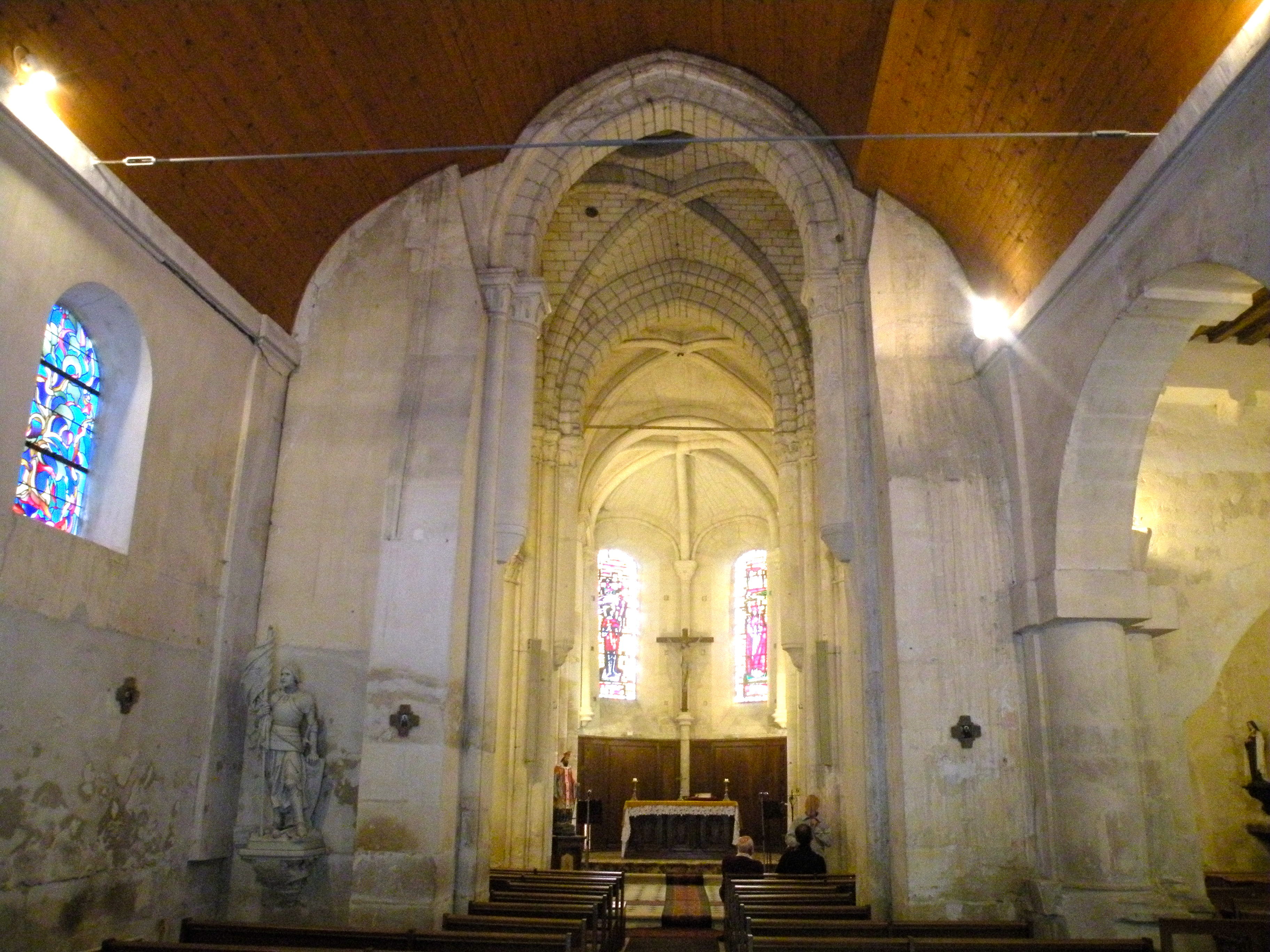 Église Saint-Denis de Jouy-le-Comte